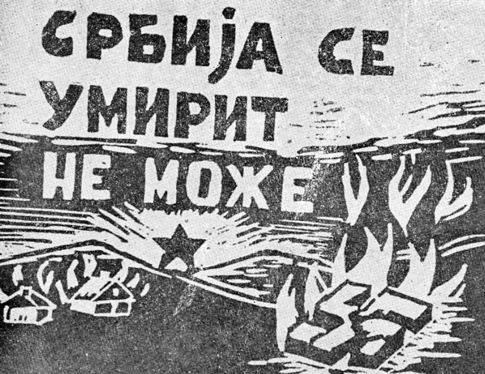 Српски (ћирилица): Устанички плакат српских партизана који позива на борбу.